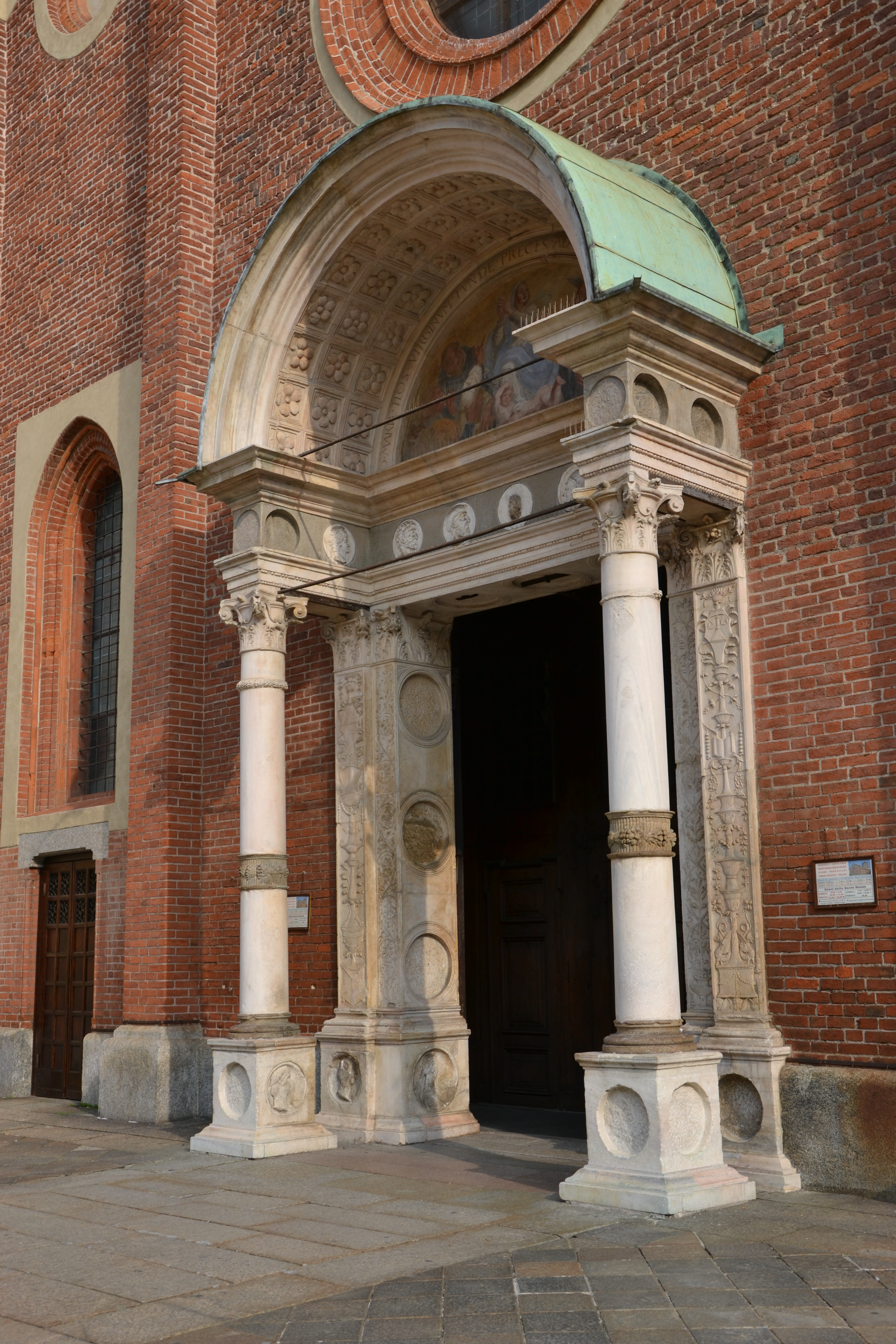 Portale, Santa Maria delle Grazie (Milan)